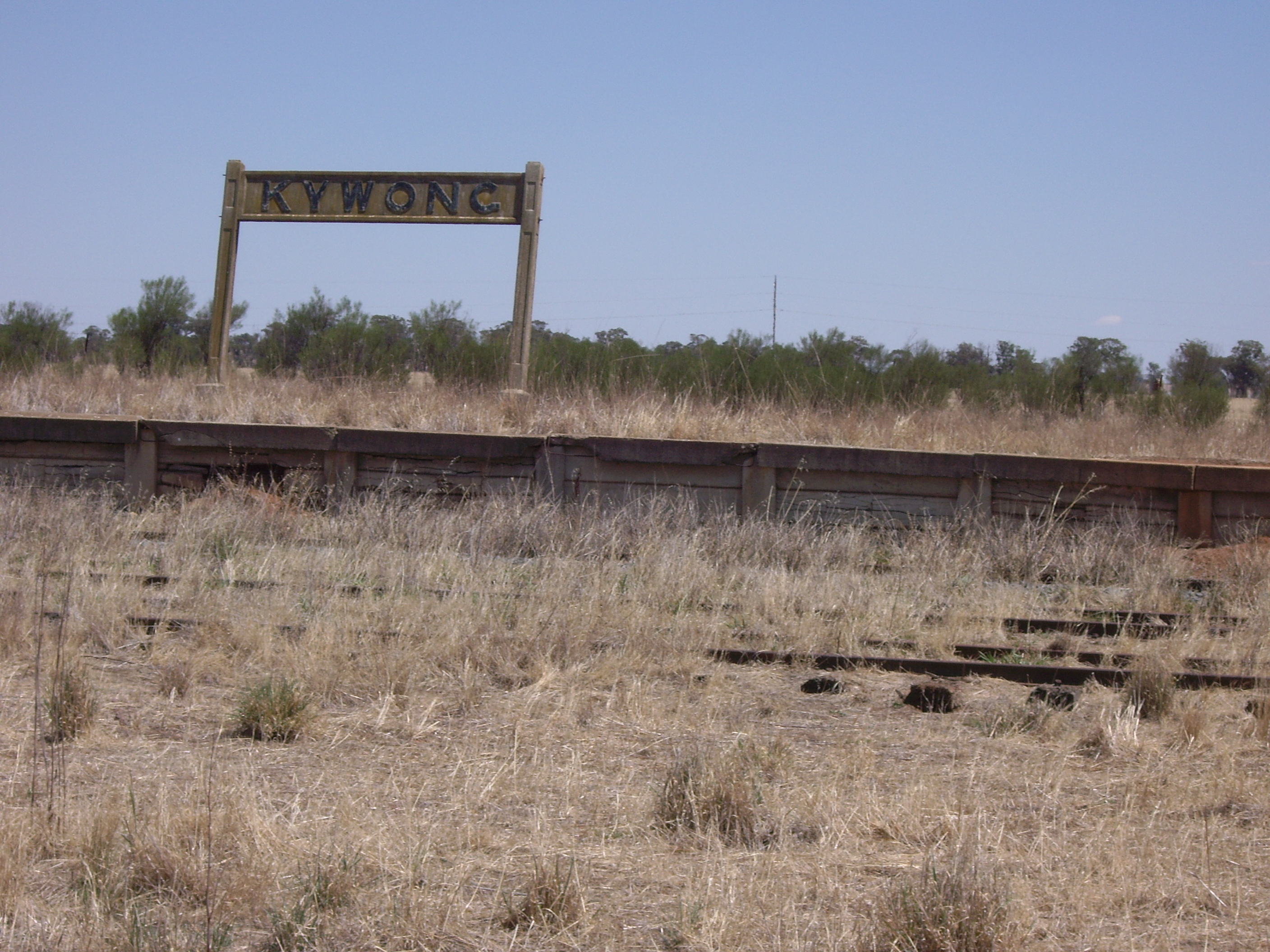 Kywong Railway Siding